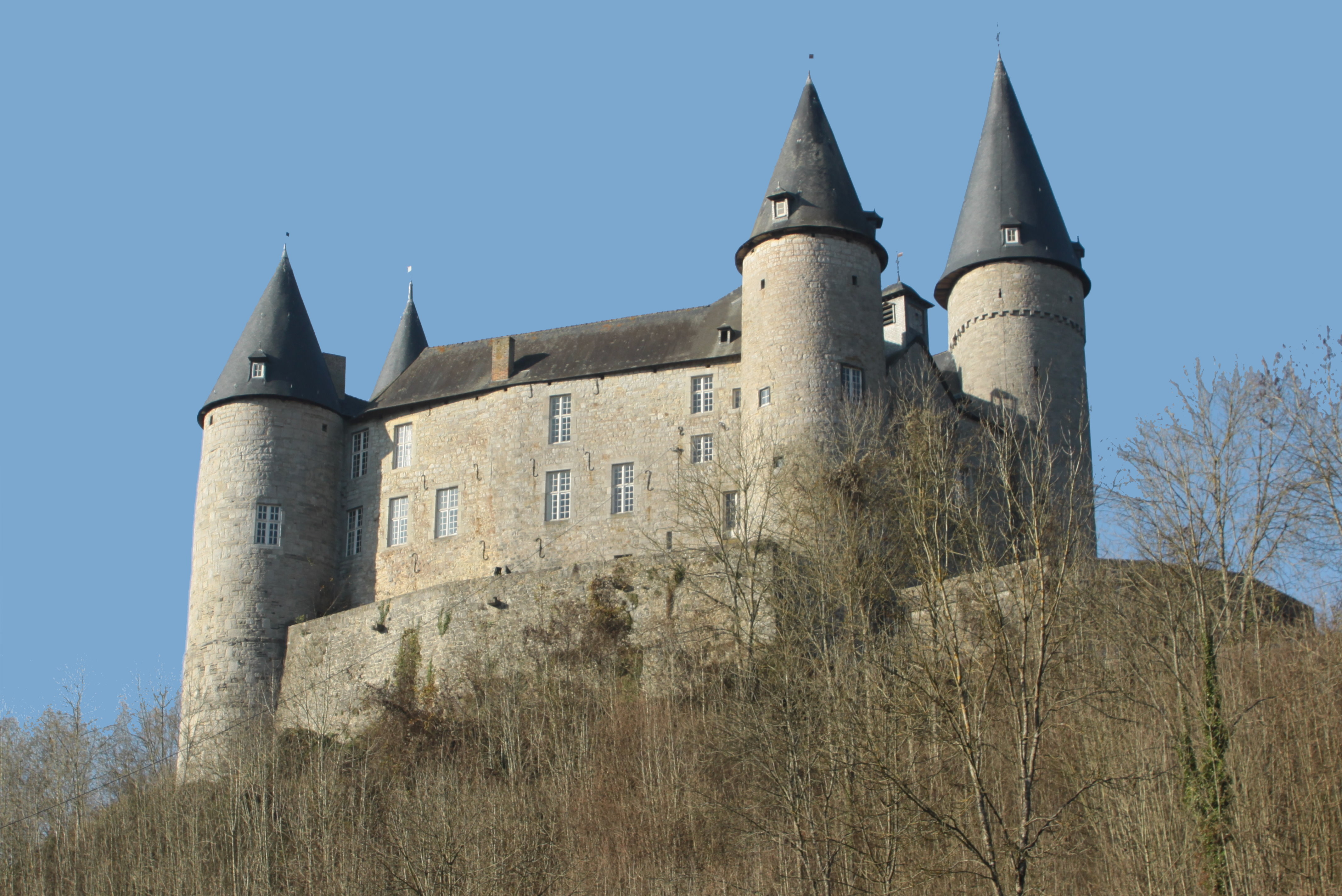 D'Schlass vu Vêves